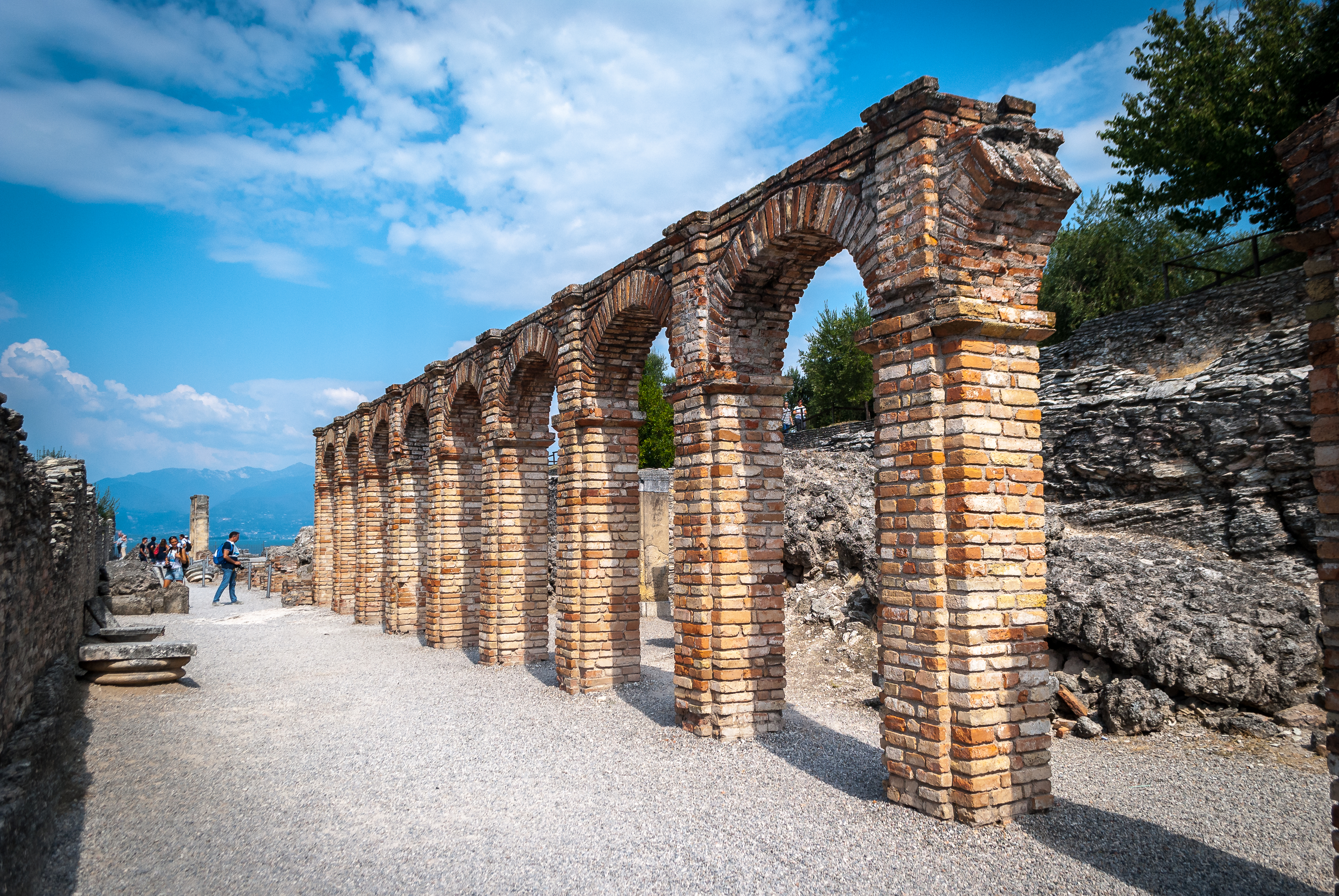 Area archeologica Grotte di Catullo This is a photo of a monument which is part of cultural heritage of Italy.